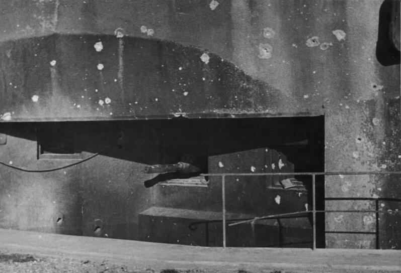 Werke der Maginotlinie südl. des Pfälzer Waldes [....?] westlich Rohrbach. 4,7 cm Pak-Scharte an der linken Seite Juli 1940 Bildberichter: Schwally